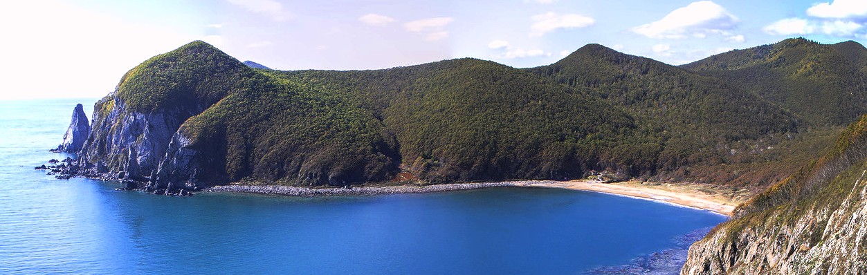 панорама полуострова Рудановского.